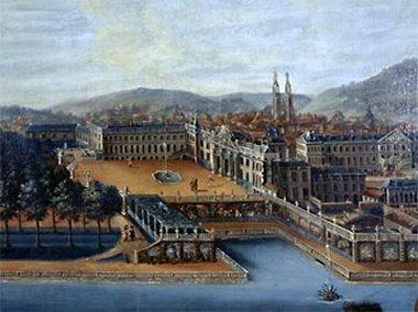 Le Château de Lunéville à l'époque de Stanislas